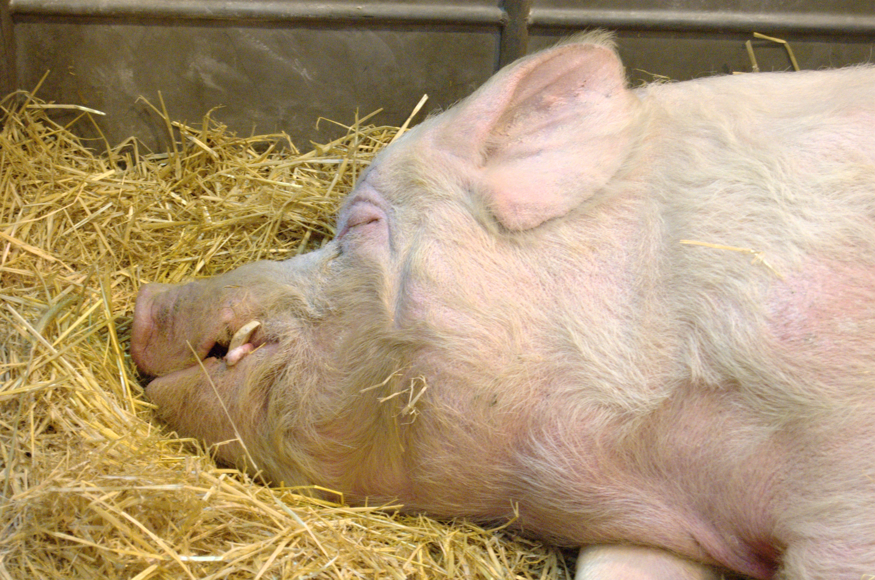 Porc - Salon international de l'agriculture 2009 - Paris - France - 22 février 2009.